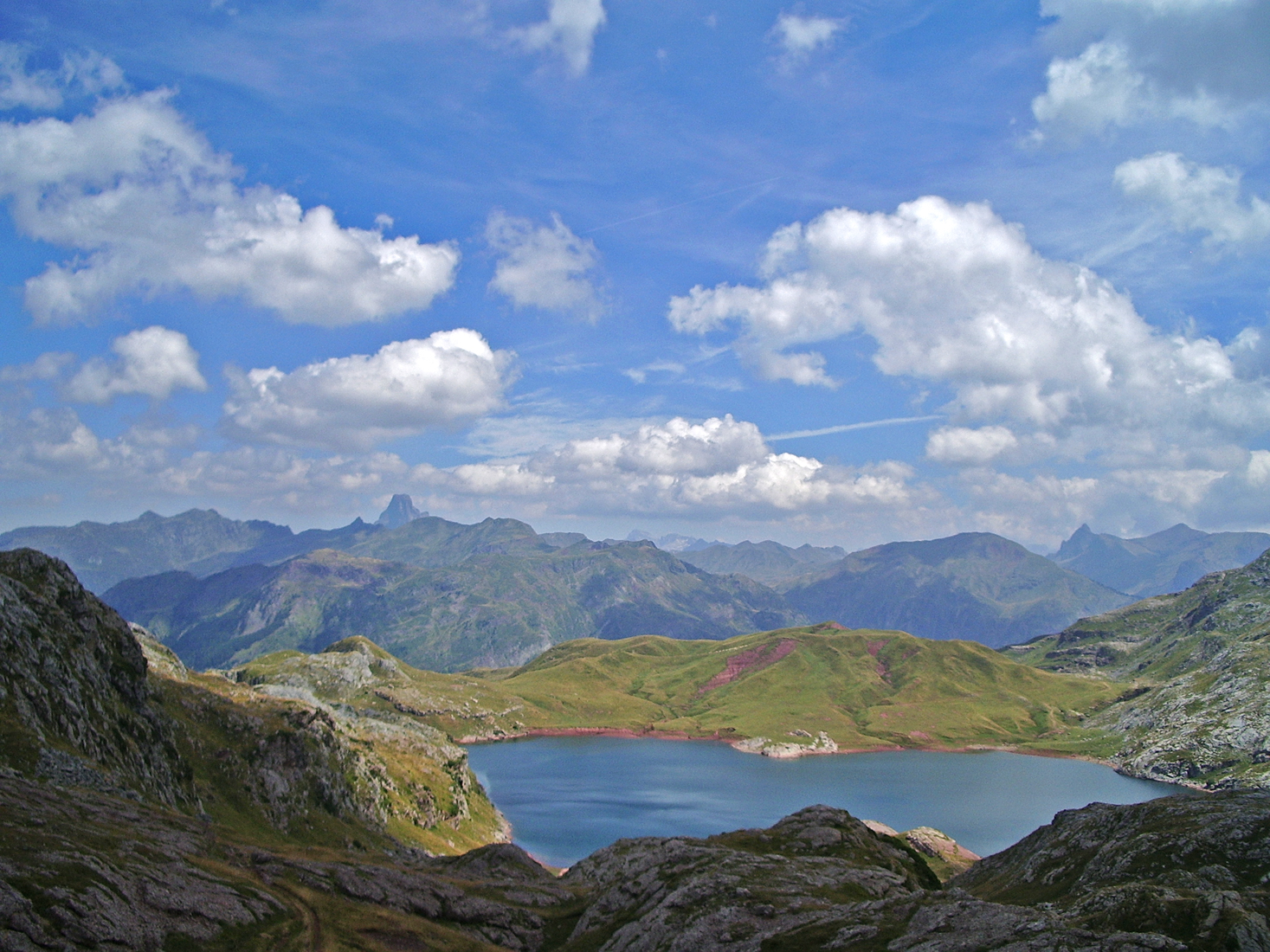 Ibón_de_Estanés (Aragón, España)